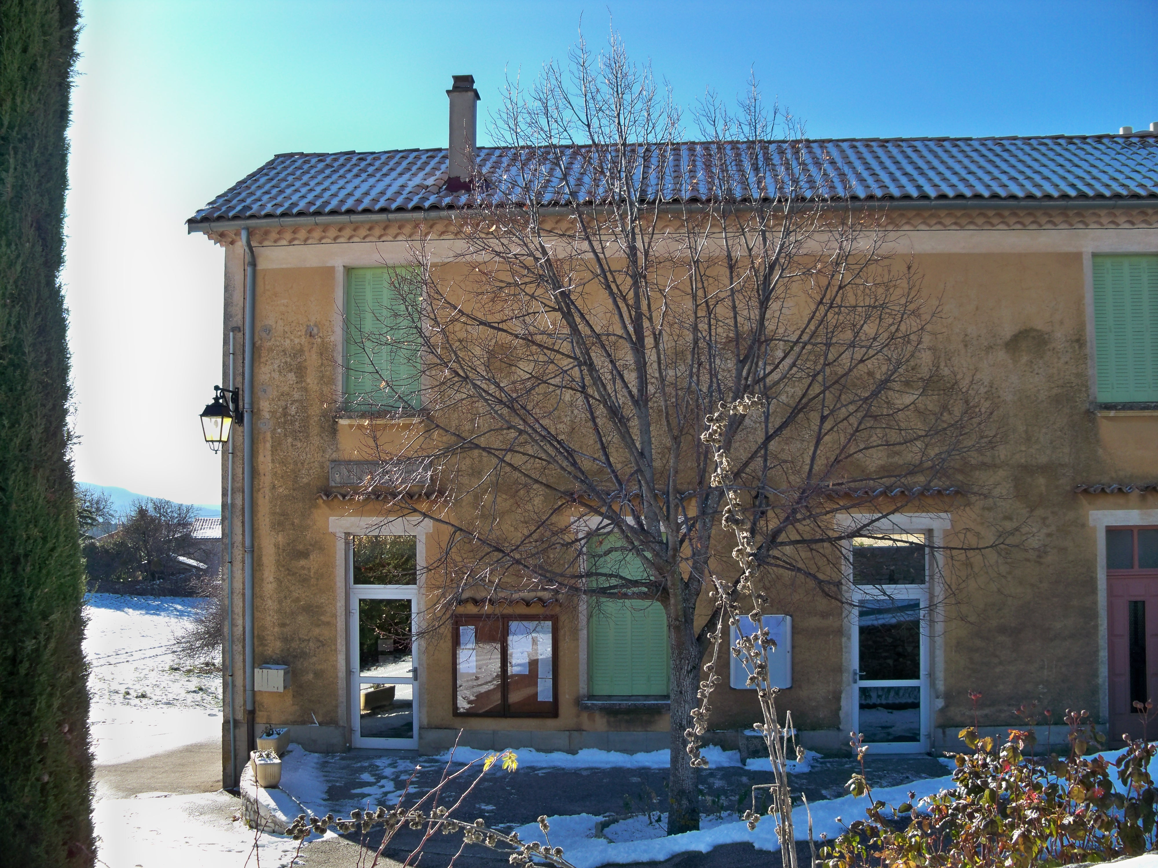 Mairie de Ferrassières, Drôme, France